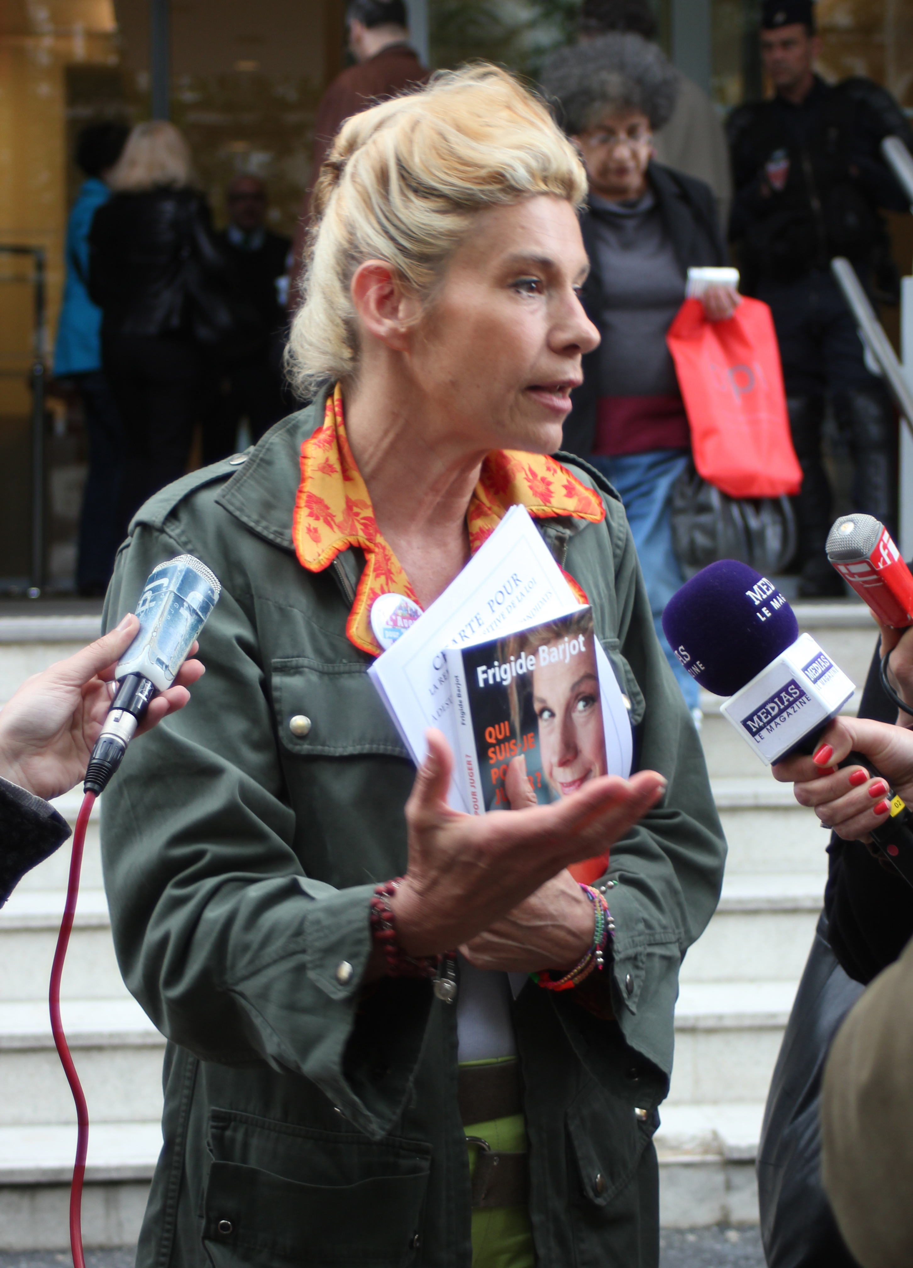 Frigide Barjot devant le Ministère des Affaires Sociales le 28 avril 2014